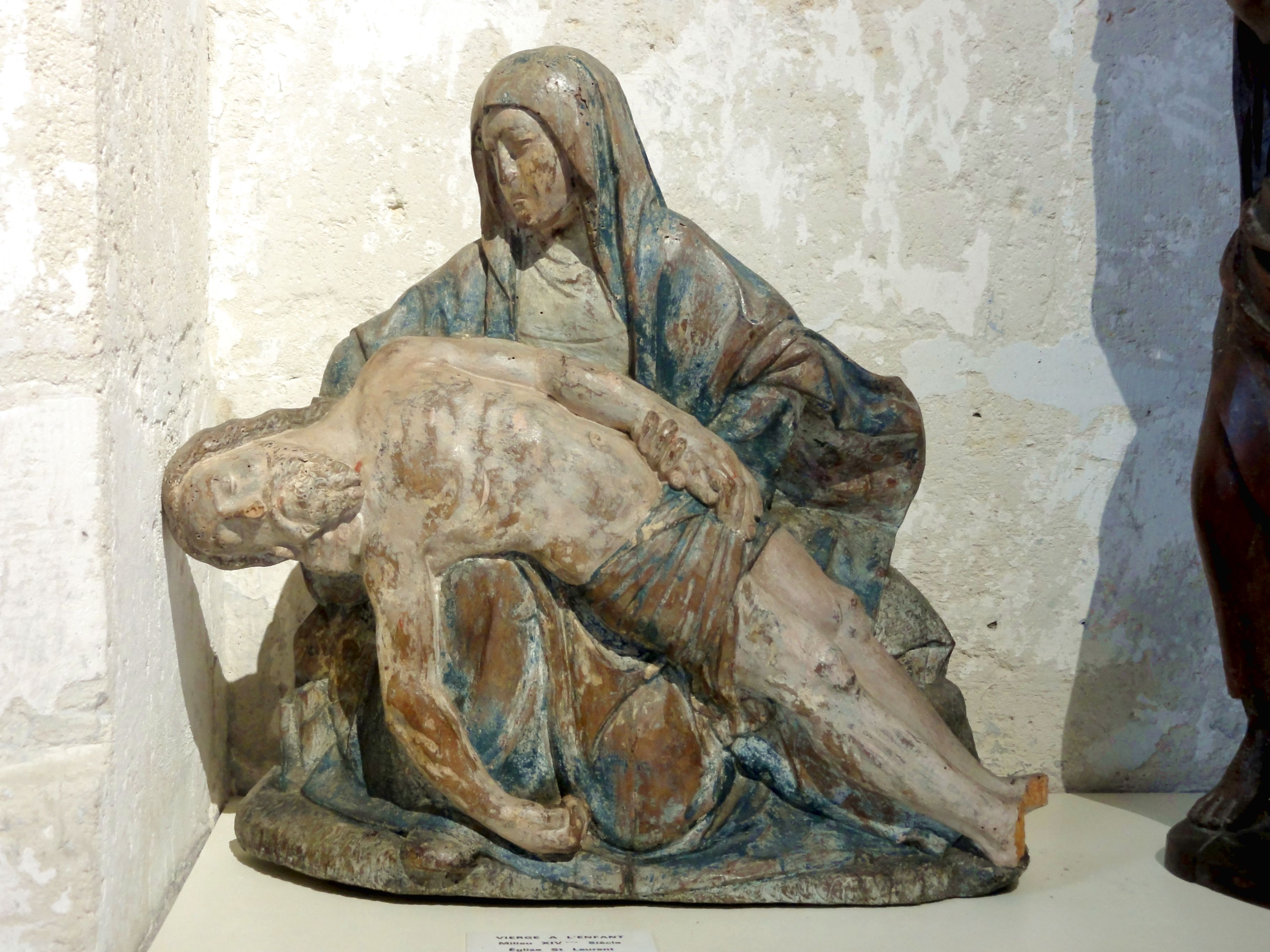 Voir titre.